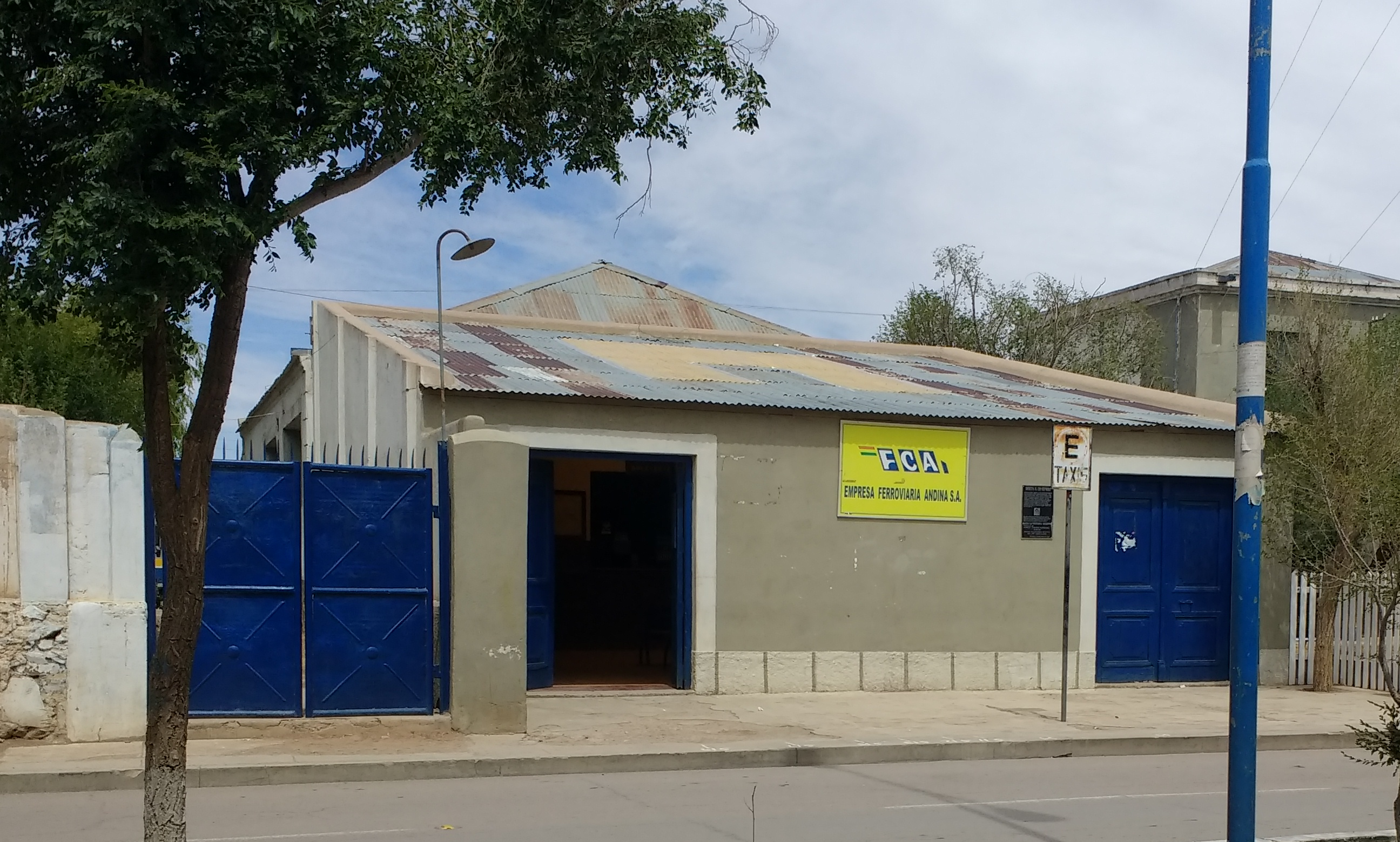 Train station in Villazón, Bolivia